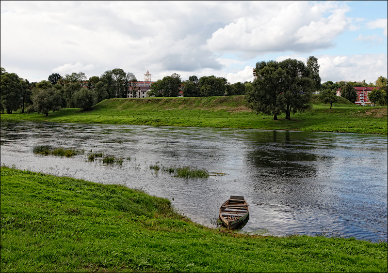 Аршанскае замчышча